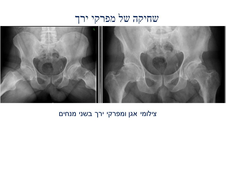 צילום אגן ומפרקי ירך בני מנחים שבו נראה שחיקה משמעותית של מפרקי הירך , עיוות ראשי הירך , היעדר מרווח בין עצמות האגן לראשי הירך